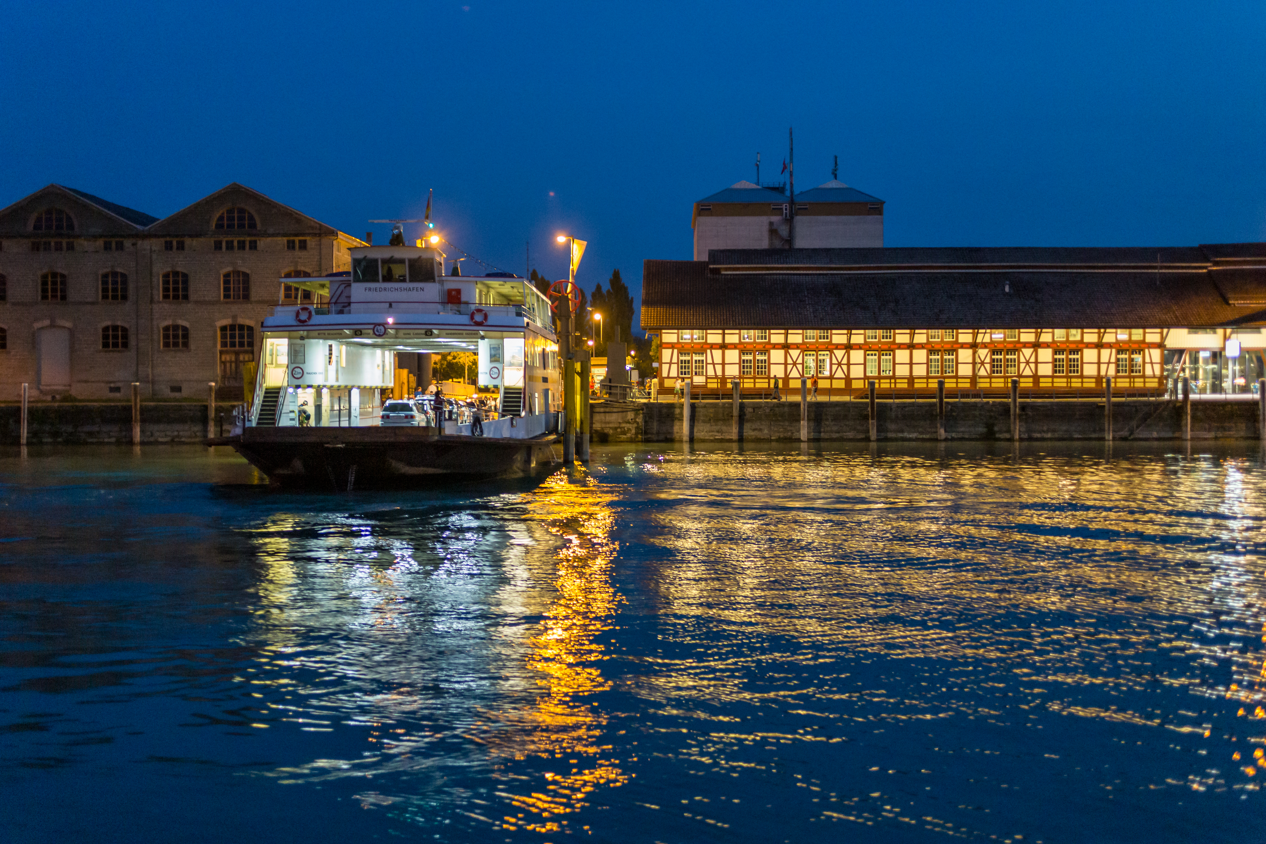 Romanshorn TG: abendliche Bodenseefähre "Friedrichshafen" nach Friedrichshafen